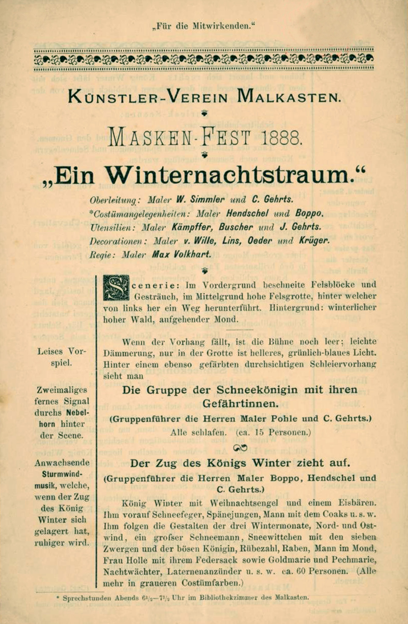 Programm Ein Winternachtstraum Masken-Fest Redoute Künstlerverein Malkasten im Februar 1888